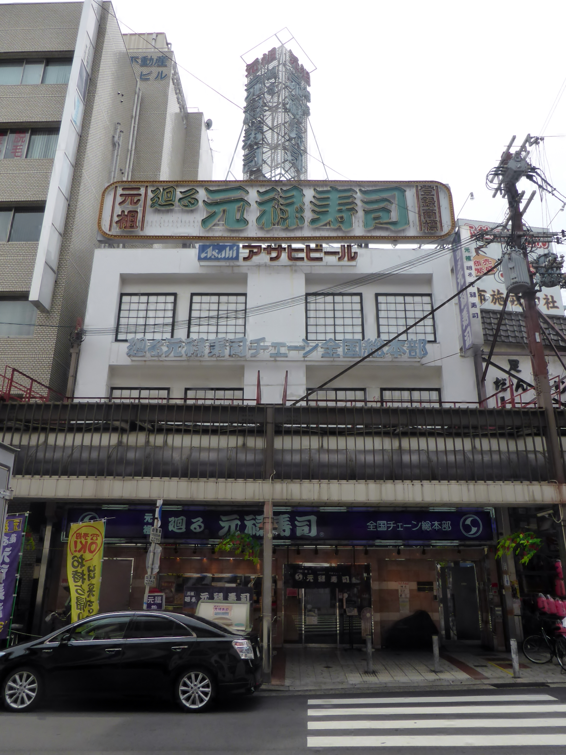 元禄寿司布施本部店を撮影